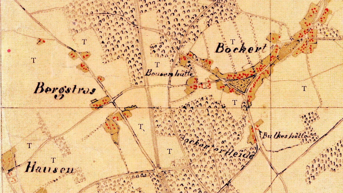 Kartenaufnahme der Rheinlande durch Tranchot und von Müffling, Blatt 42 (Viersen), Ausschnitt mit dem Gebiet der heutigen Viersener Ortsteile Bergerstraße und Bockert.